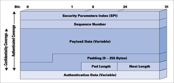 Монгол: threee